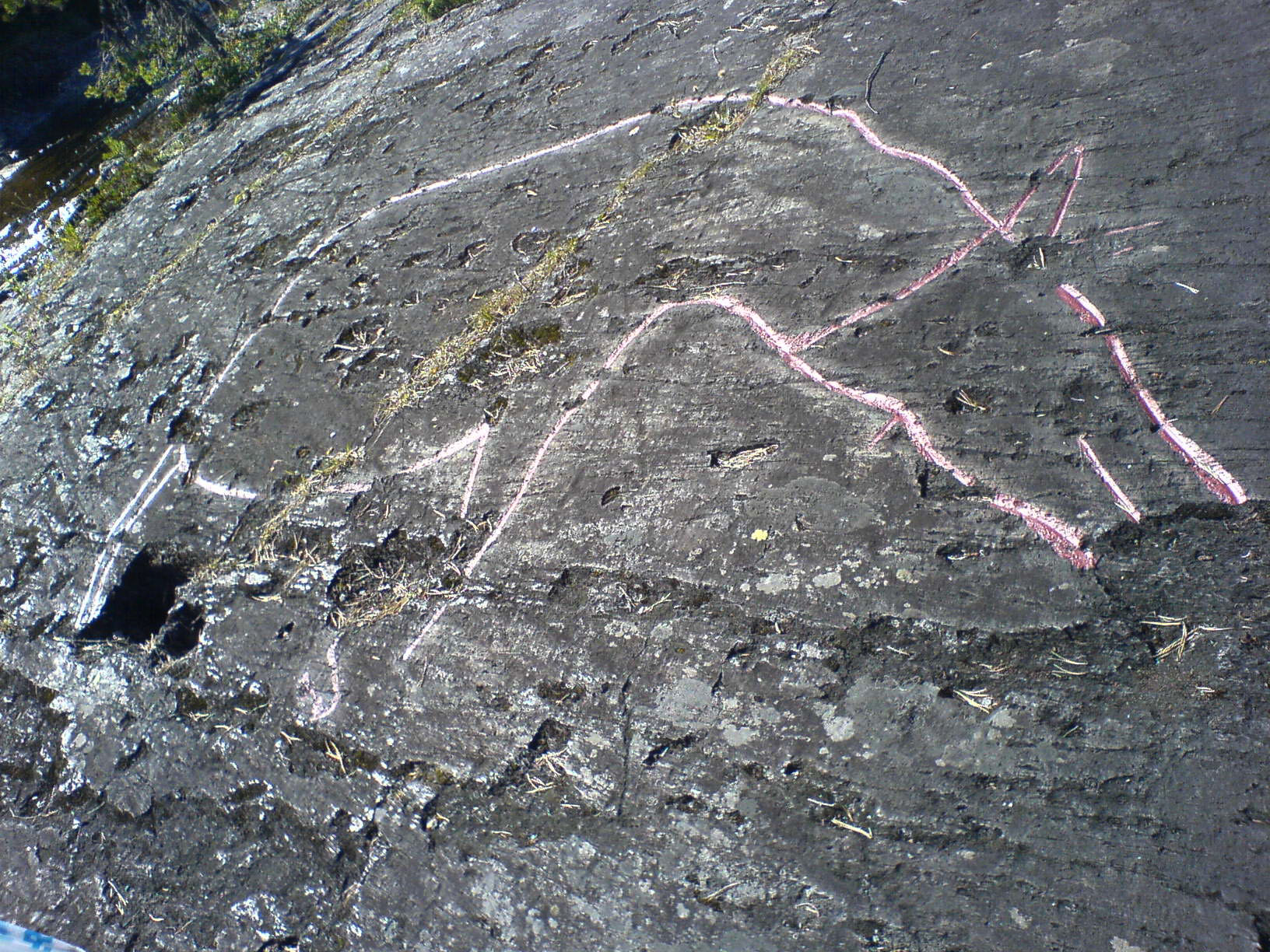 Hällristningar vid Gärde i Jämtlands län.